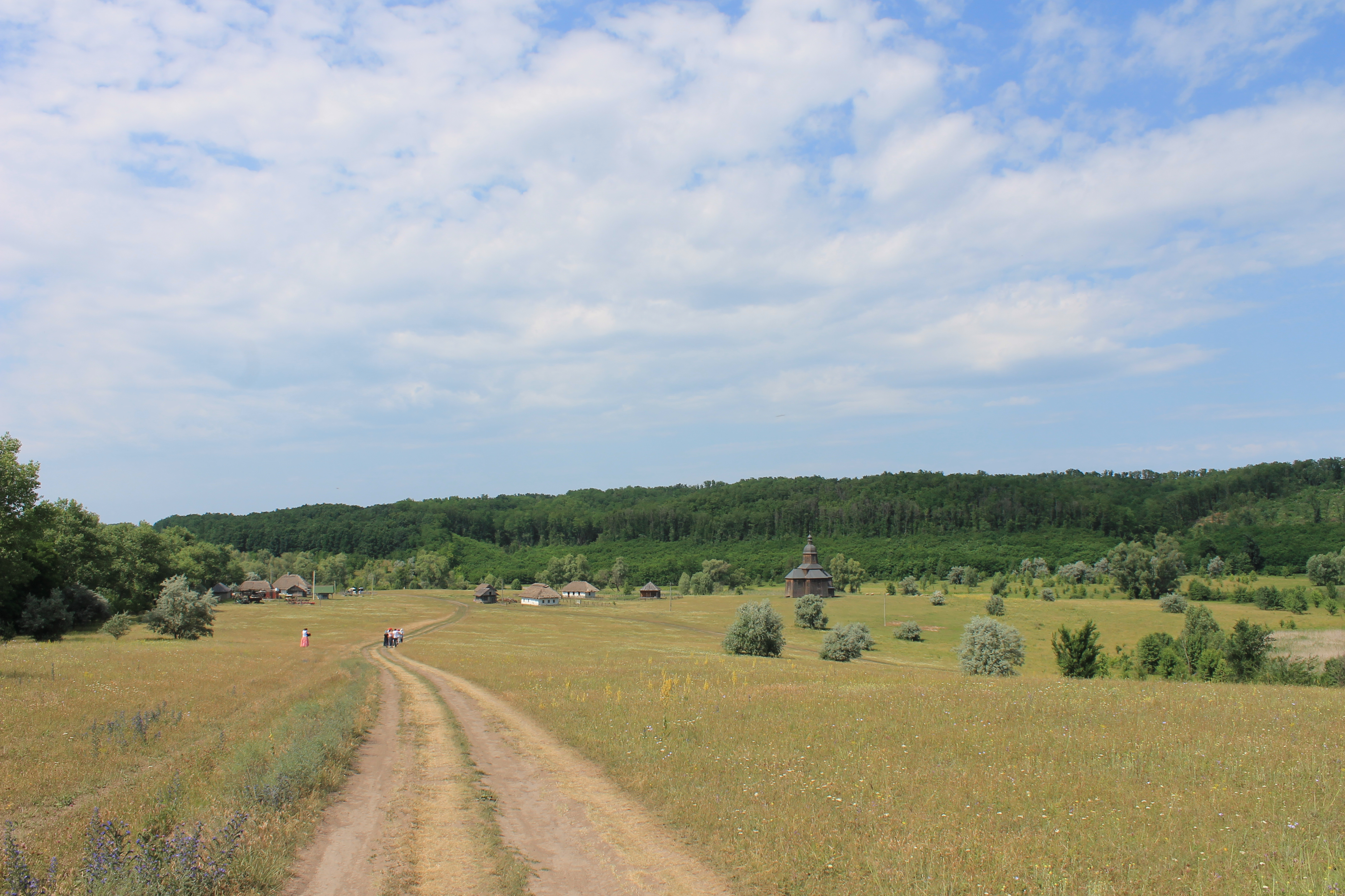 Комплексна пам'ятка природи урочище «Сухі колодки», В адмінмежах Стецівської сільської ради Чигиринського району. Входить до складу Національного історико-культурного заповіднику «Чигирин».